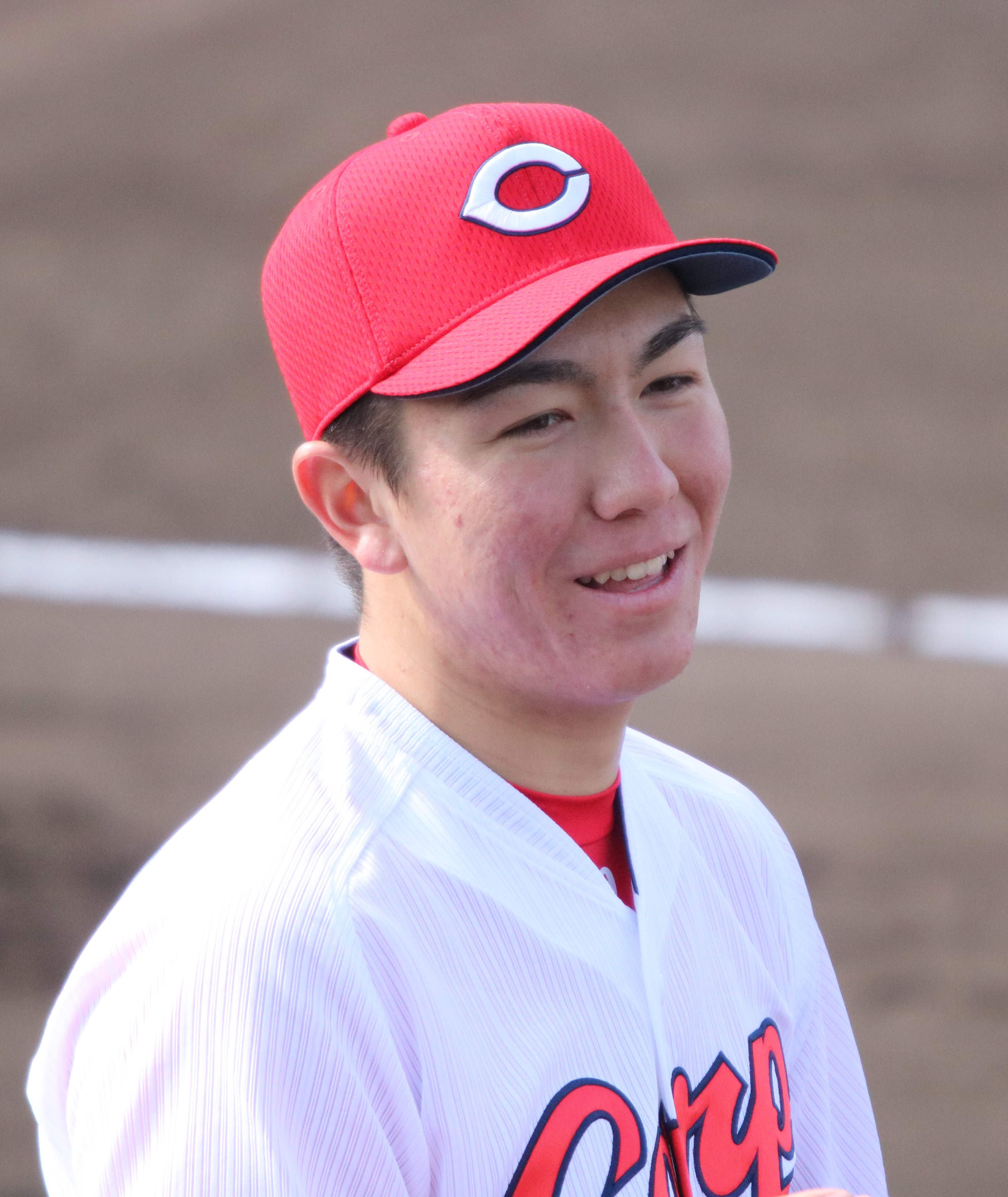 2018/2/8 春季キャンプ(東光寺球場)